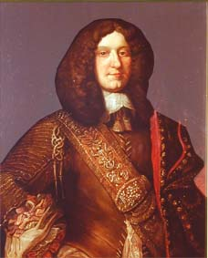 Maleri af Kaj Lykke (1625-1699) fra Bramming Hovedgaard